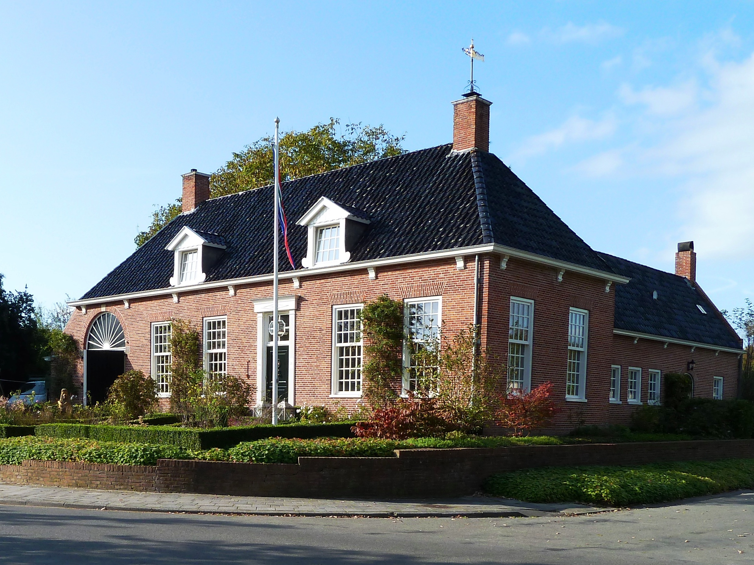 Het volledig herbouwde schathuis van de vroegere Hanckemaborg aan de Hanckemalaan van Zuidhorn. Herbouwd en uitgebreid in 1965.